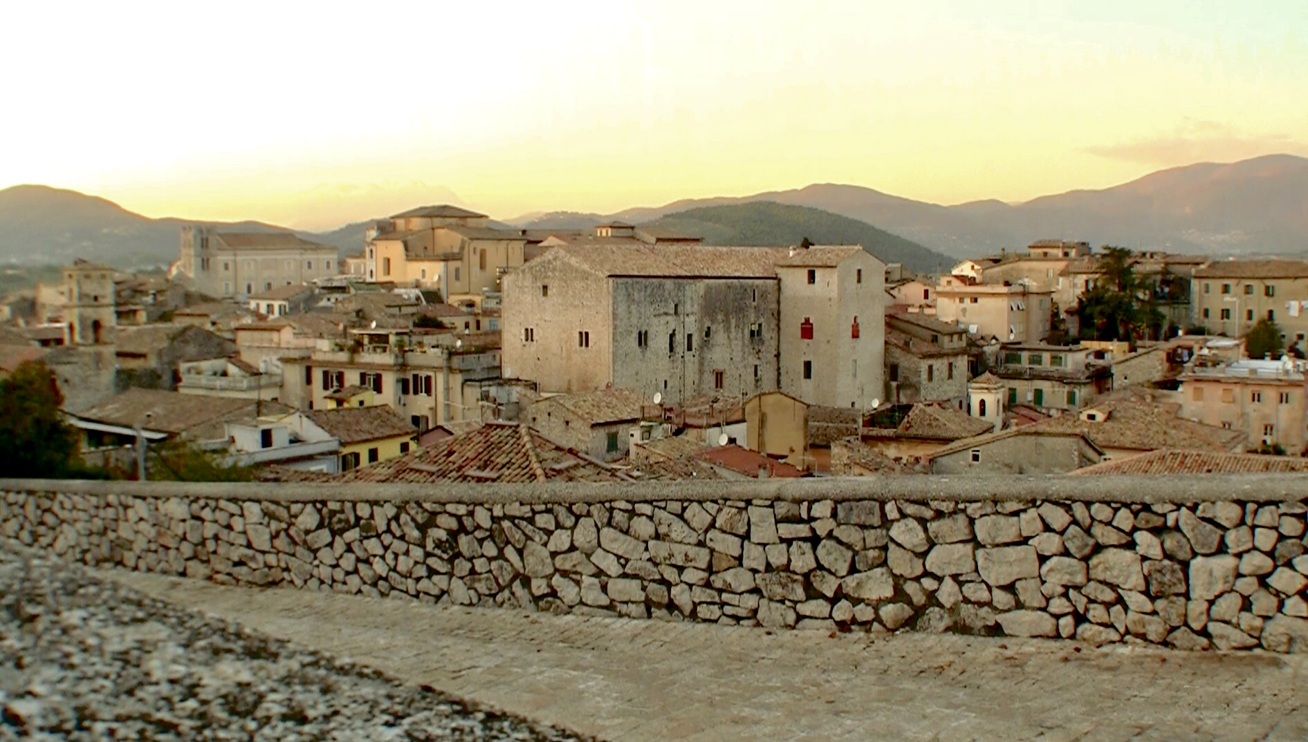 Alatri, panorama da Civita